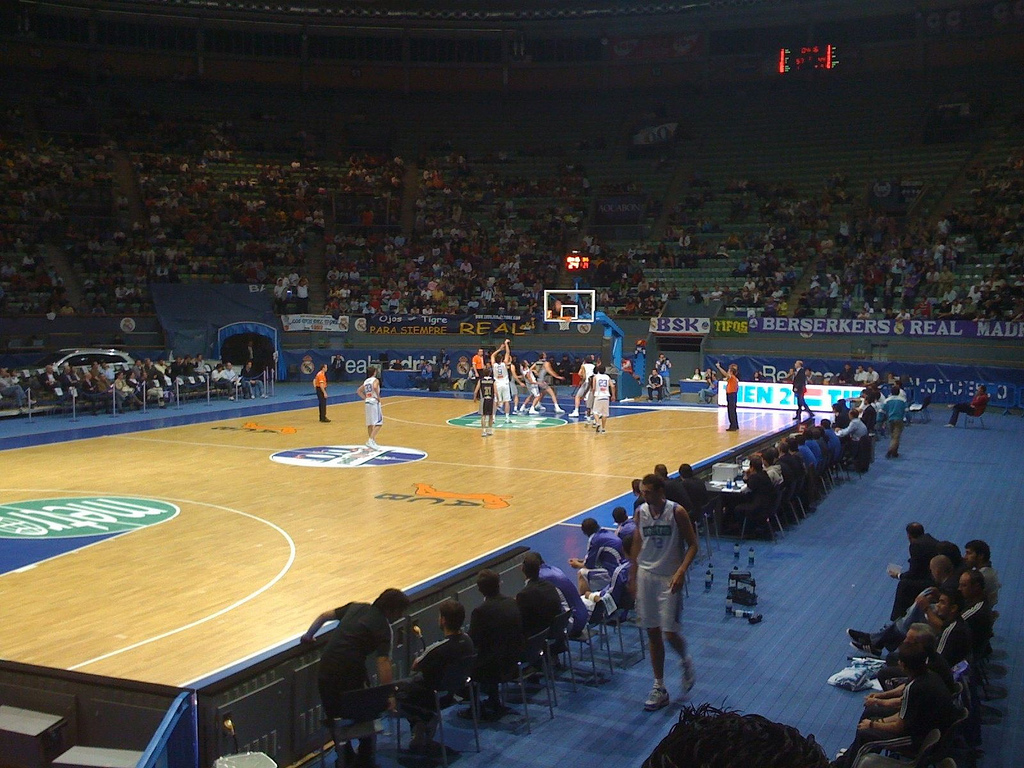 Tiro libre en el partido Real Madrid - ViveMenorca en el Palacio de Vistalegre el día 30 de Abril